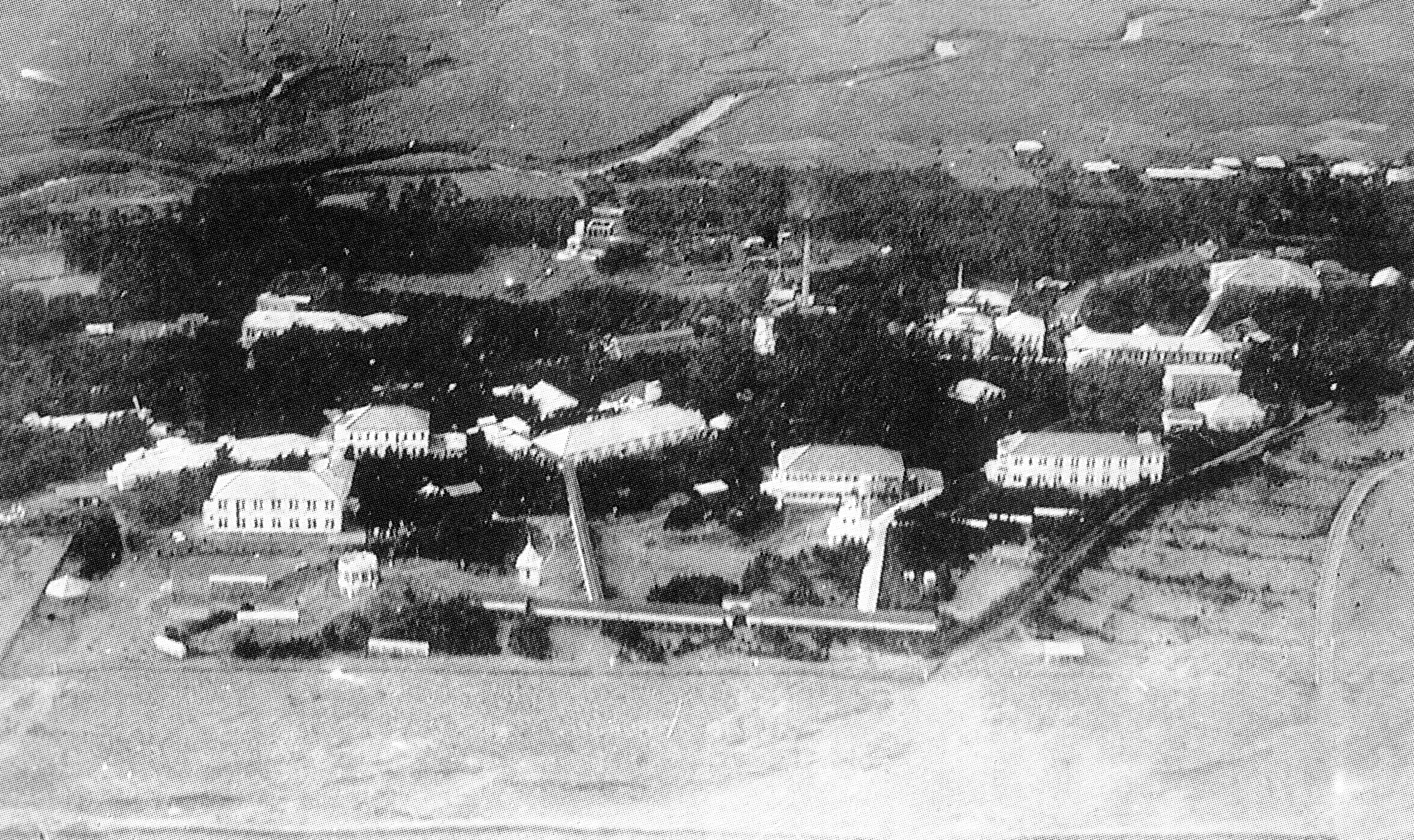 1926年頃の南湖院の航空写真。